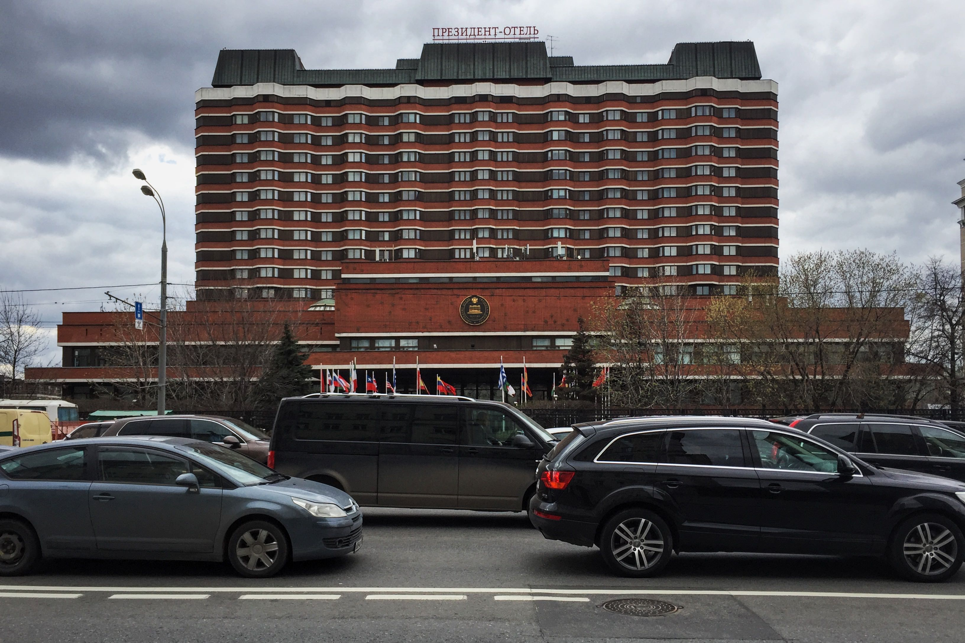 Большая Якиманка, 24. Гостиница «Президент-Отель» управления делами президента РФ